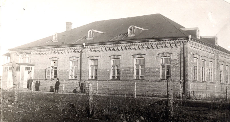 Здание Мирской иешивы. 1931-1932 годы.